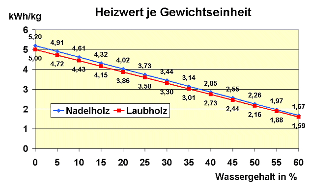 Grafik Heizwert von Brennholz (Laubholz/Nadelholz) je Gewichtseinheit